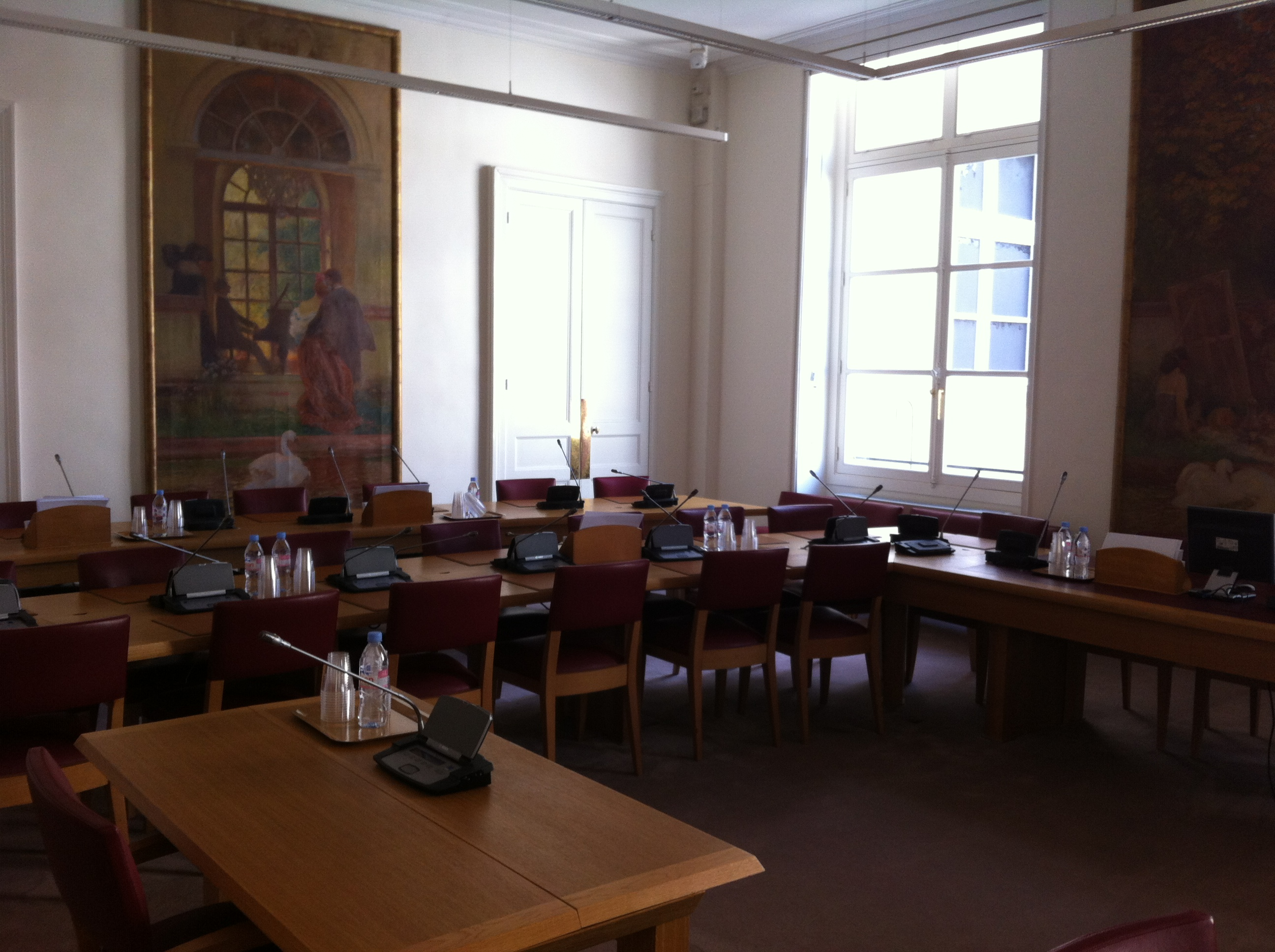 Sénat palais du Luxembourg